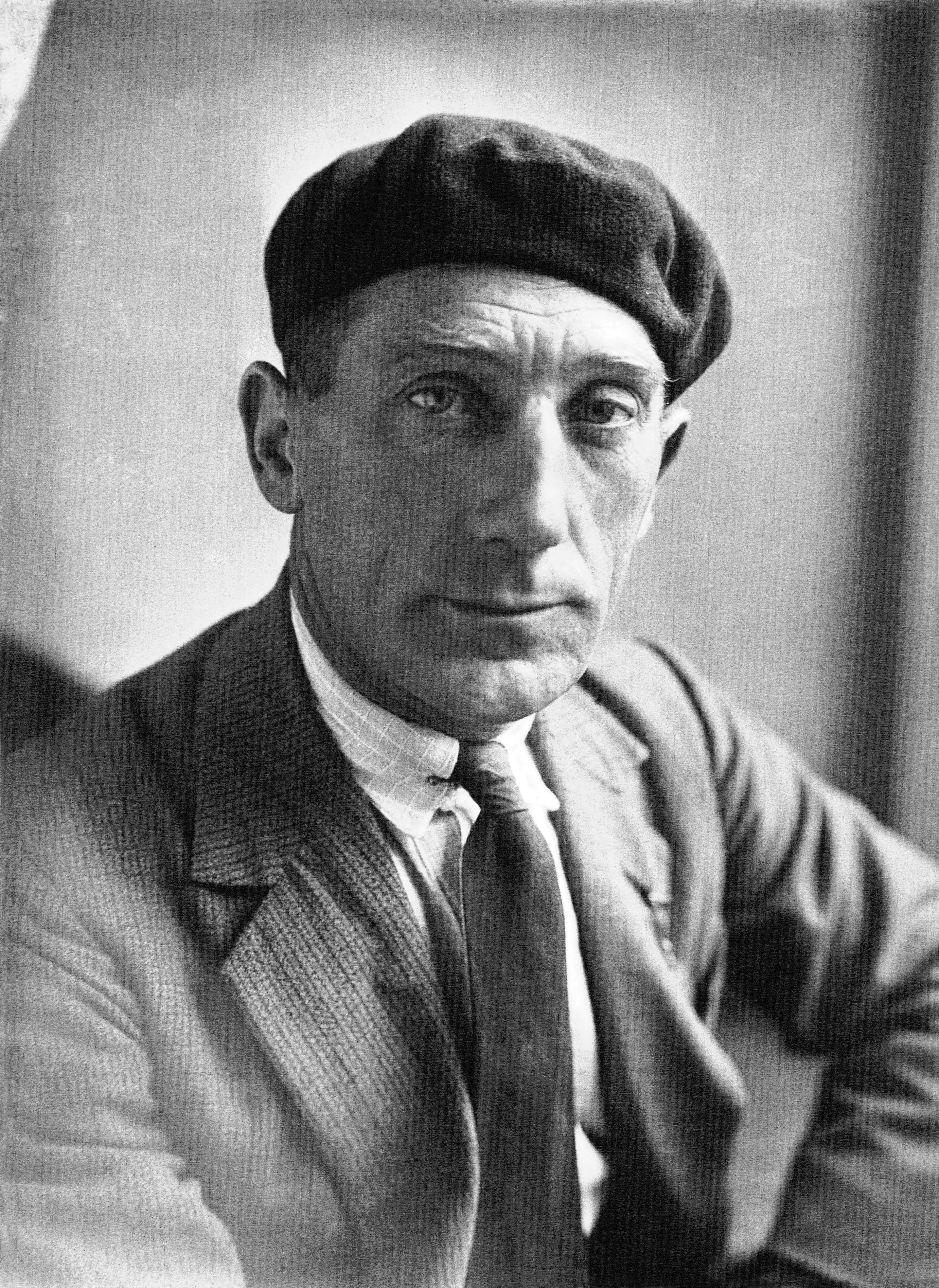 Victor Fontan lors du Tour de France 1929